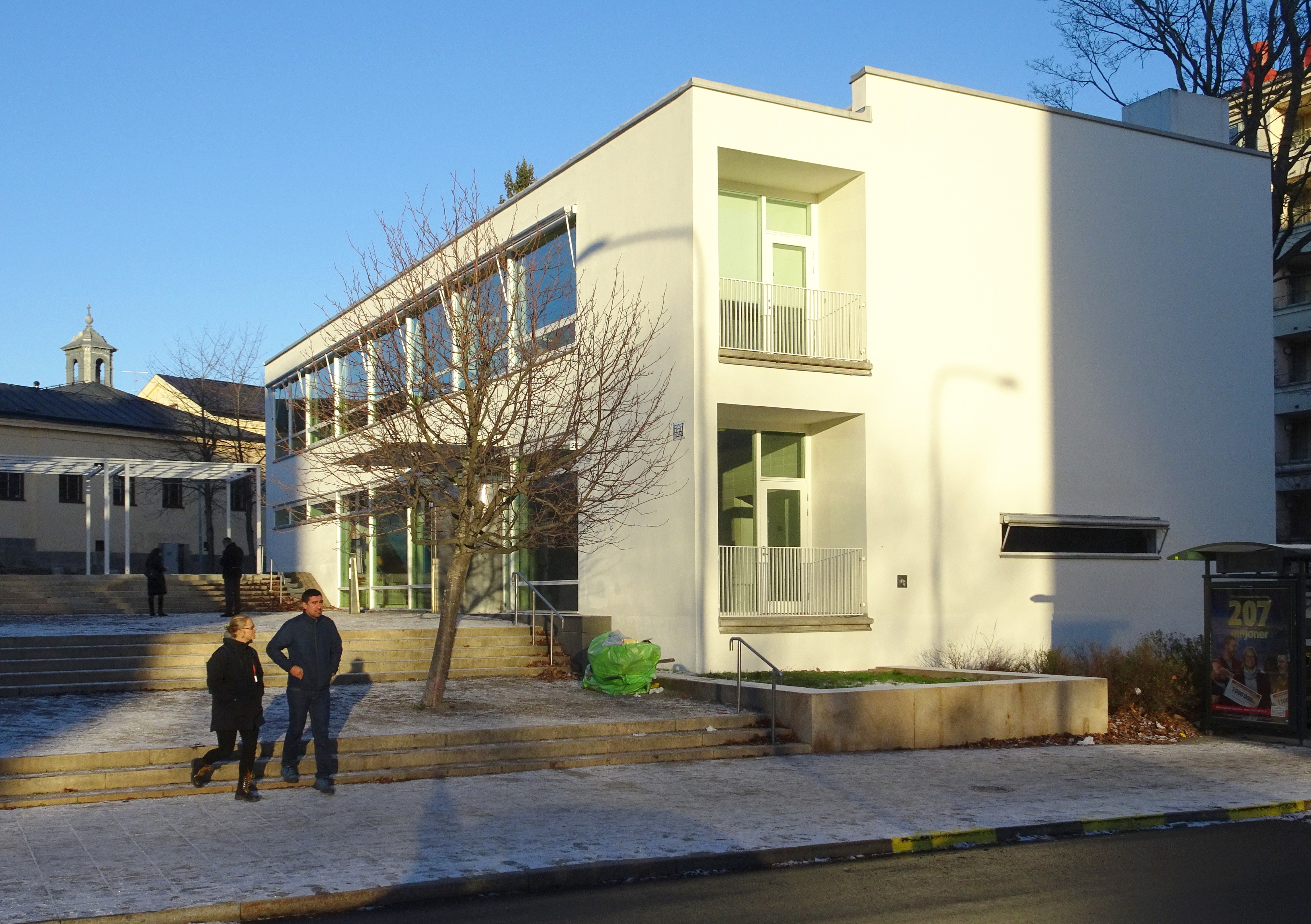 Konradsbergs idrottshall, arkitekt Bjurström & Brodin, 1999-2000